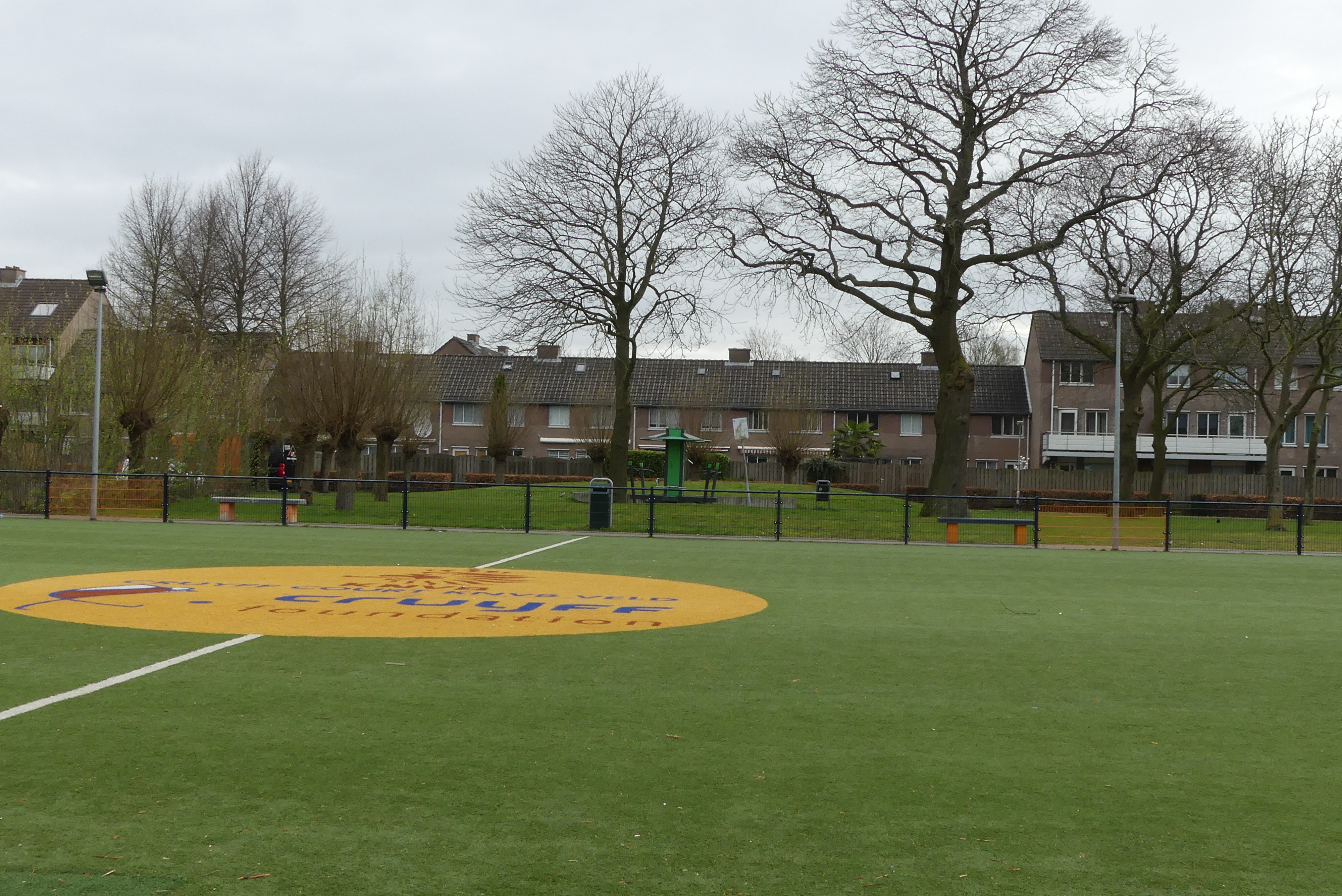 Zicht op Cruyff Court met watertappunt gelegen in de wijk Kesteren nabij Kindcentrum Olympia tevens speelplek voor kinderen gelegen niet ver van station Prinsenbeek in het stadsdeel de Haagse Beemden in het noorden van Breda